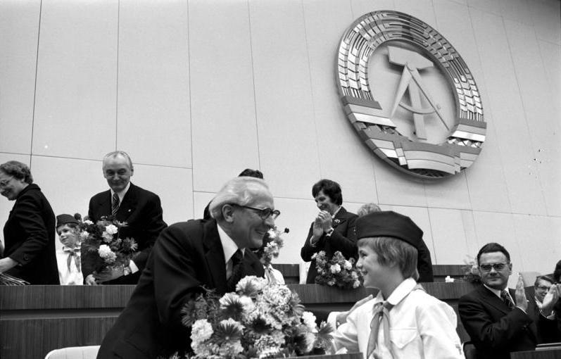 Honecker zum Staatsratsvorsitzenden gewählt ADN-ZB/Koard/29.10.76/Berlin: Volkskammertagung/ Nach der Wahl des Generalsekretärs des ZK der SED, Erich Honecker (l.), zum Vorsitzenden des Staatsrates der Deutschen Demokratischen Republik während der 1. (konstituierenden) Tagung der Volkskammer der DDR in Berlin überreichte ein Mitglied der Pionierorganisation "Ernst Thälmann" Erich HONECKER einen Blumenstrauß. Abgebildete Personen: Honecker, Erich: Staatsratsvorsitzender, Generalsekretär des ZK der SED, DDR (GND 118553399)